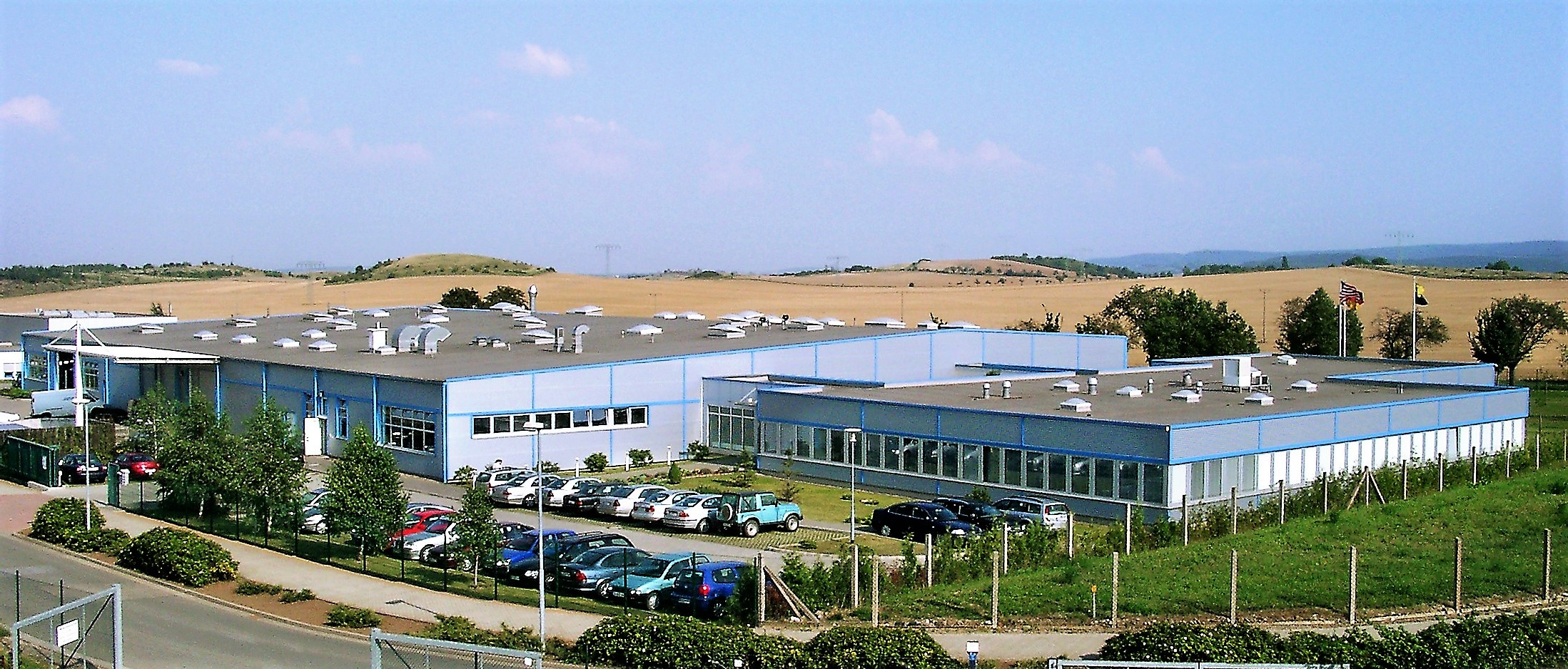 Mertik Maxitrol Thale Frontansicht